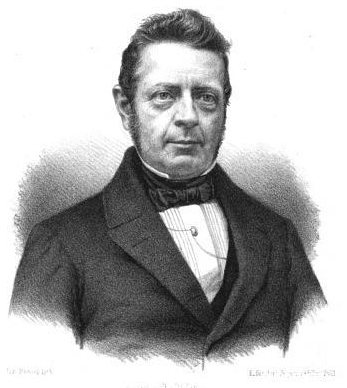 Ulrik Anton Motzfeldt (1807–1865)